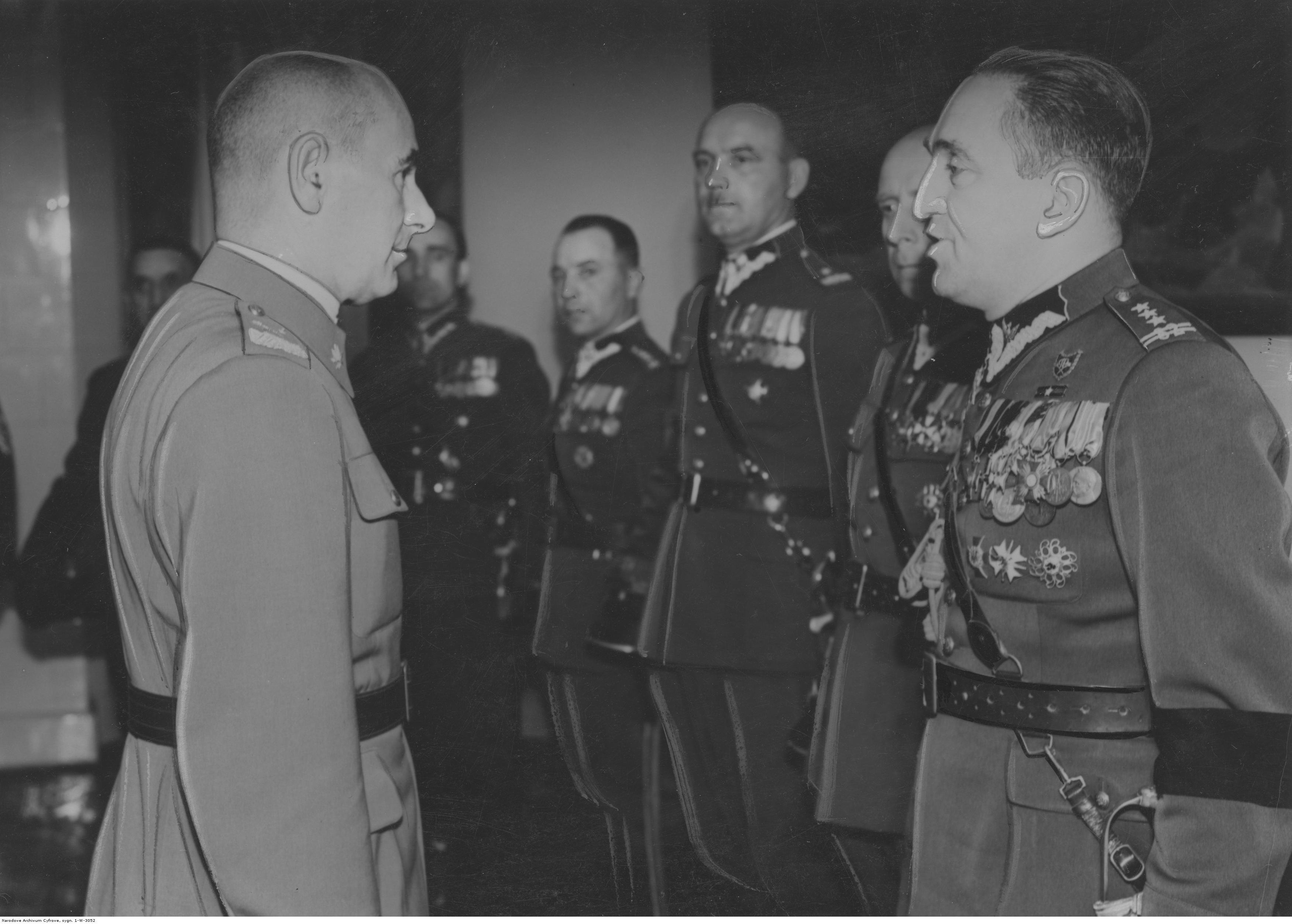 Delegacja 16 Pomorskiej Dywizji Piechoty przekazuje marszałkowi Edwardowi Rydzowi-Śmigłemu dary na Fundusz Obrony Narodowej. Koncern Ilustrowany Kurier Codzienny - Archiwum Ilustracji. Sygnatura: 1-W-3052